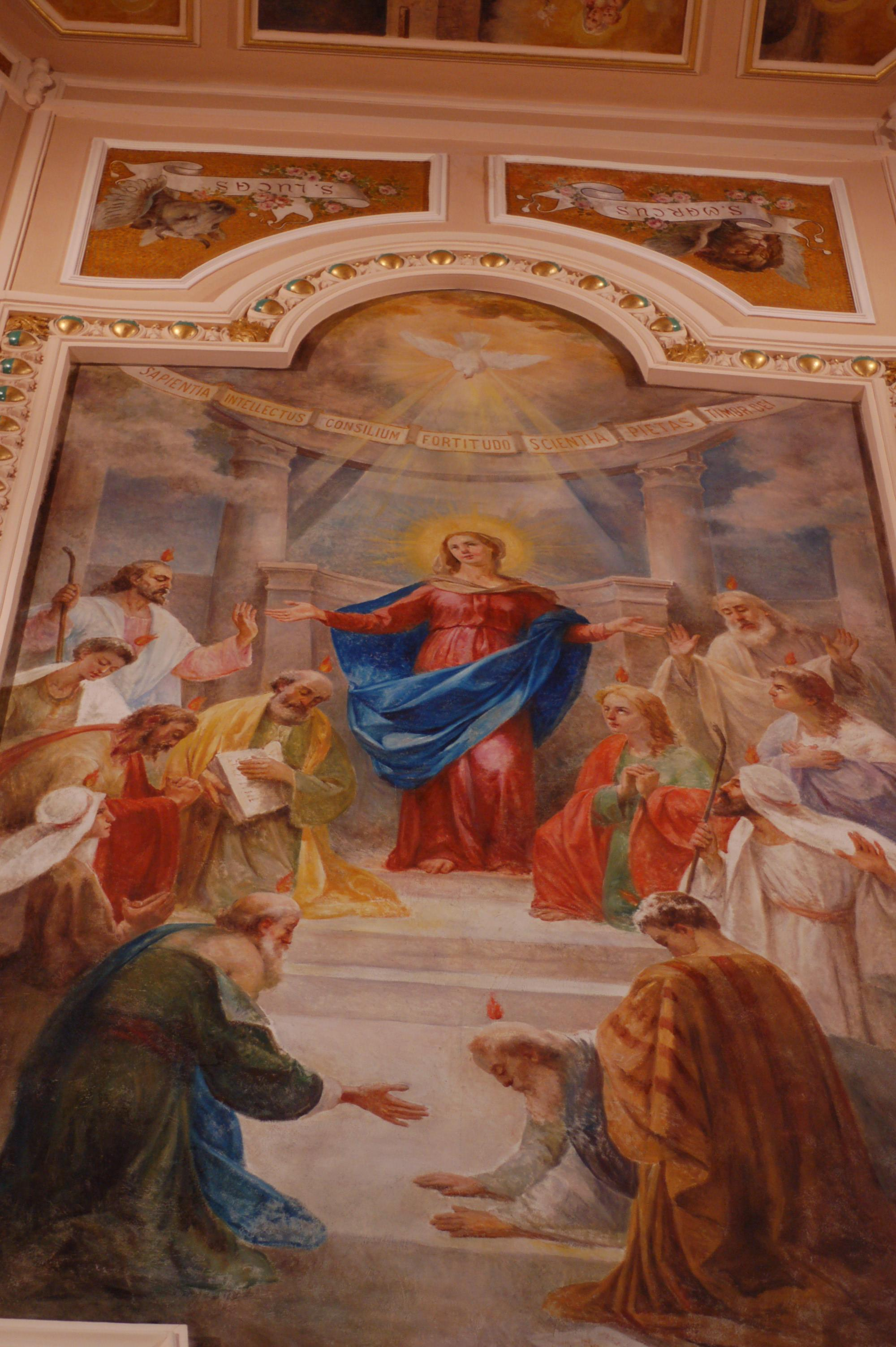 dipinto di Diego Grillo